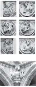 Eskoriatza Eskibel jauregia, Gasteiz